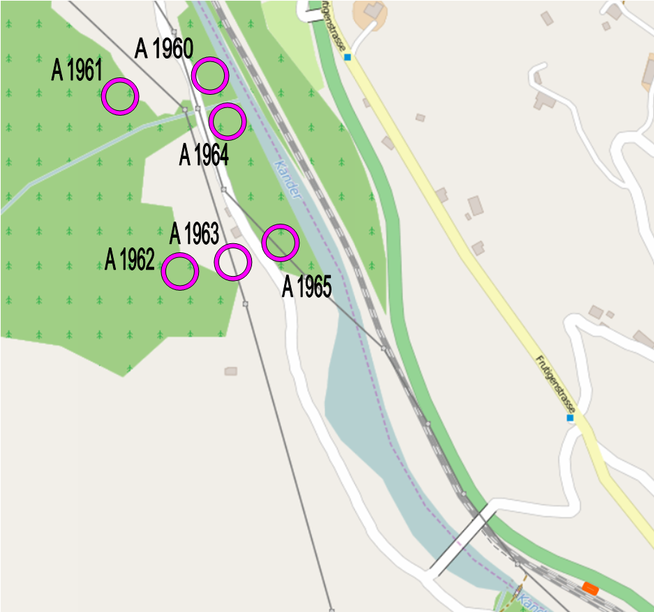 Artillerieschilde Heustrich BE, Schweiz